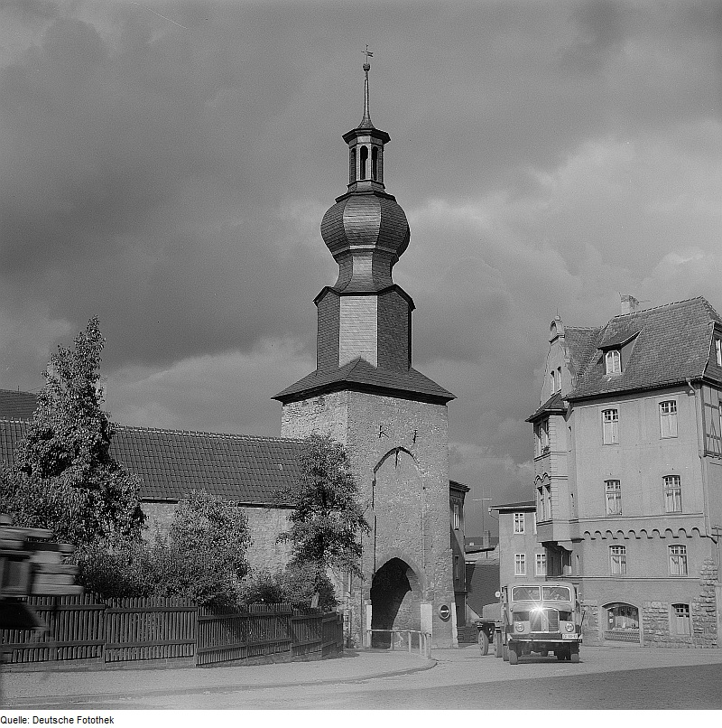 Original image description from the Deutsche Fotothek Saalfeld. Oberes Tor bzw. "Oberköditzer" Tor